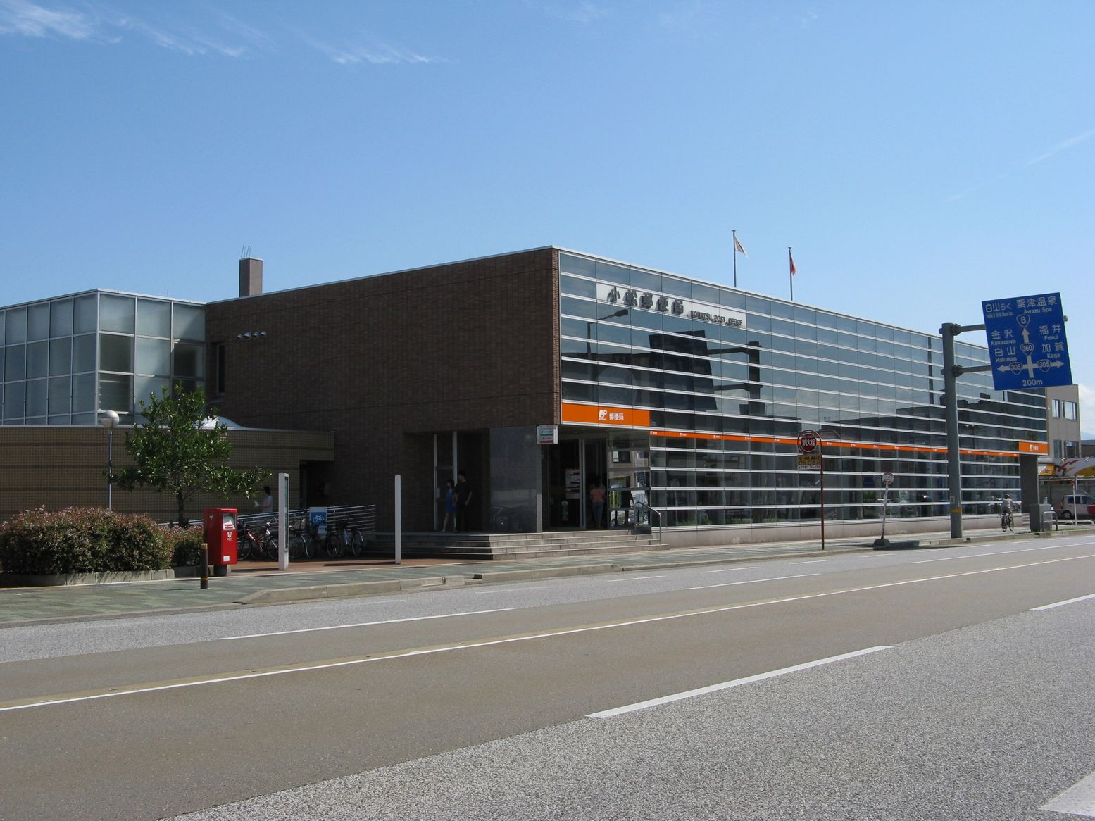 小松郵便局 (石川県)